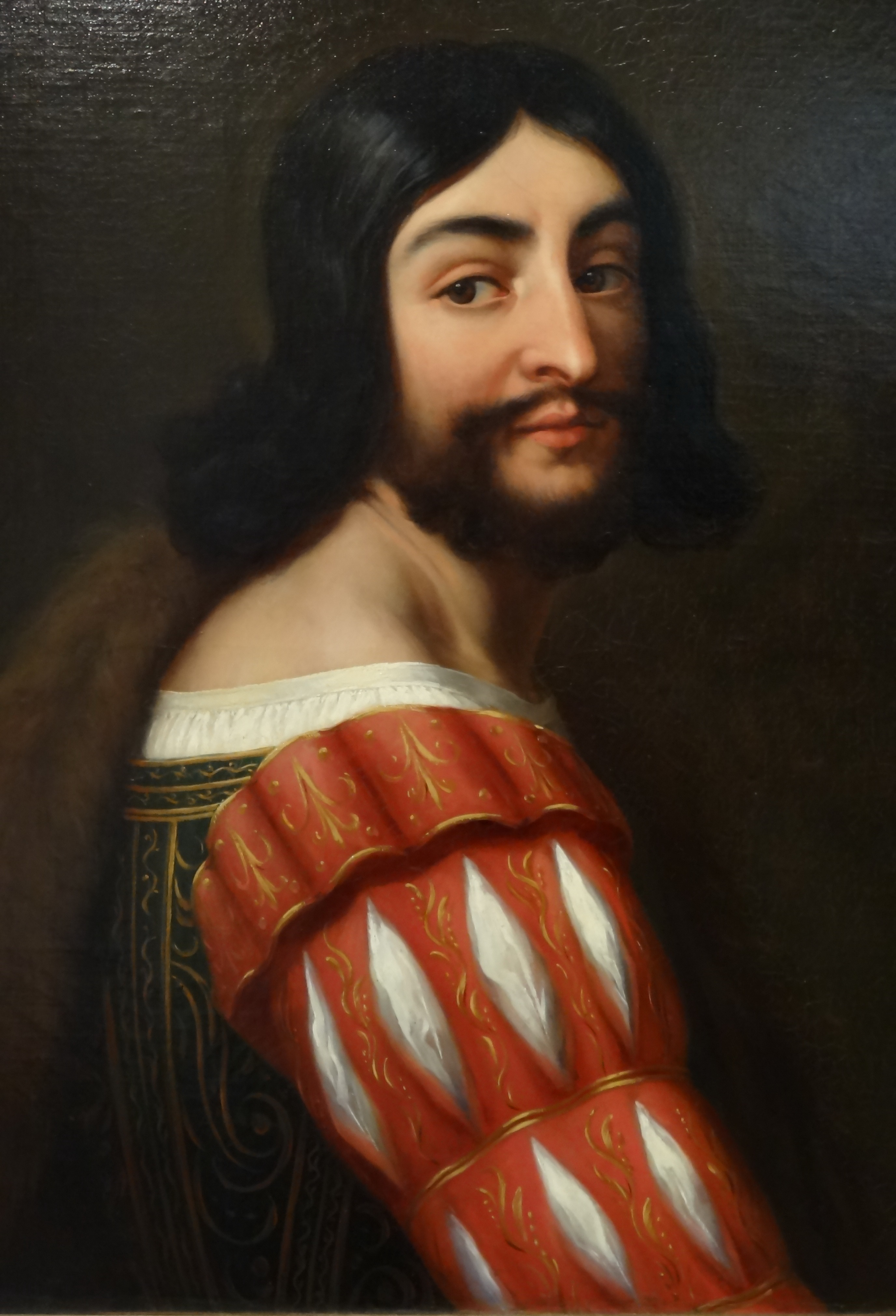 Портрет выполнен с оригинала, хранившегося прежде в коллекции мадемуазель де Монпансье в шато д'Э, по заказу короля Луи-Филиппа для Исторического музея Версаля в 1836 году.